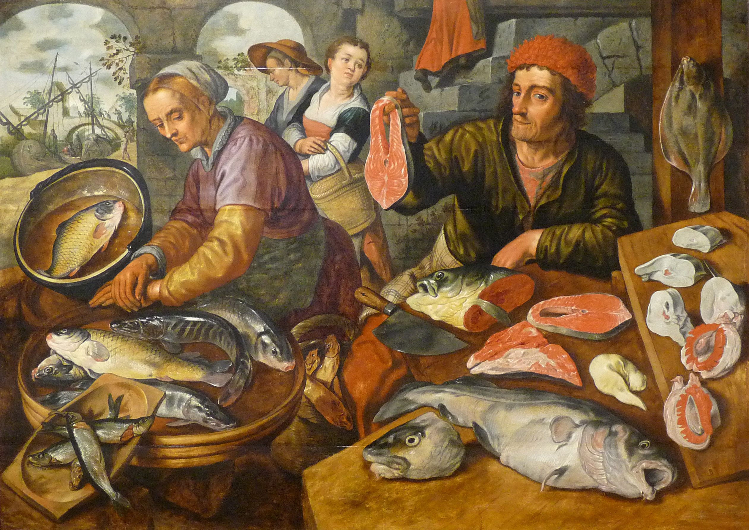 Le Marché aux poissonslabel QS:Lfr,"Le Marché aux poissons"